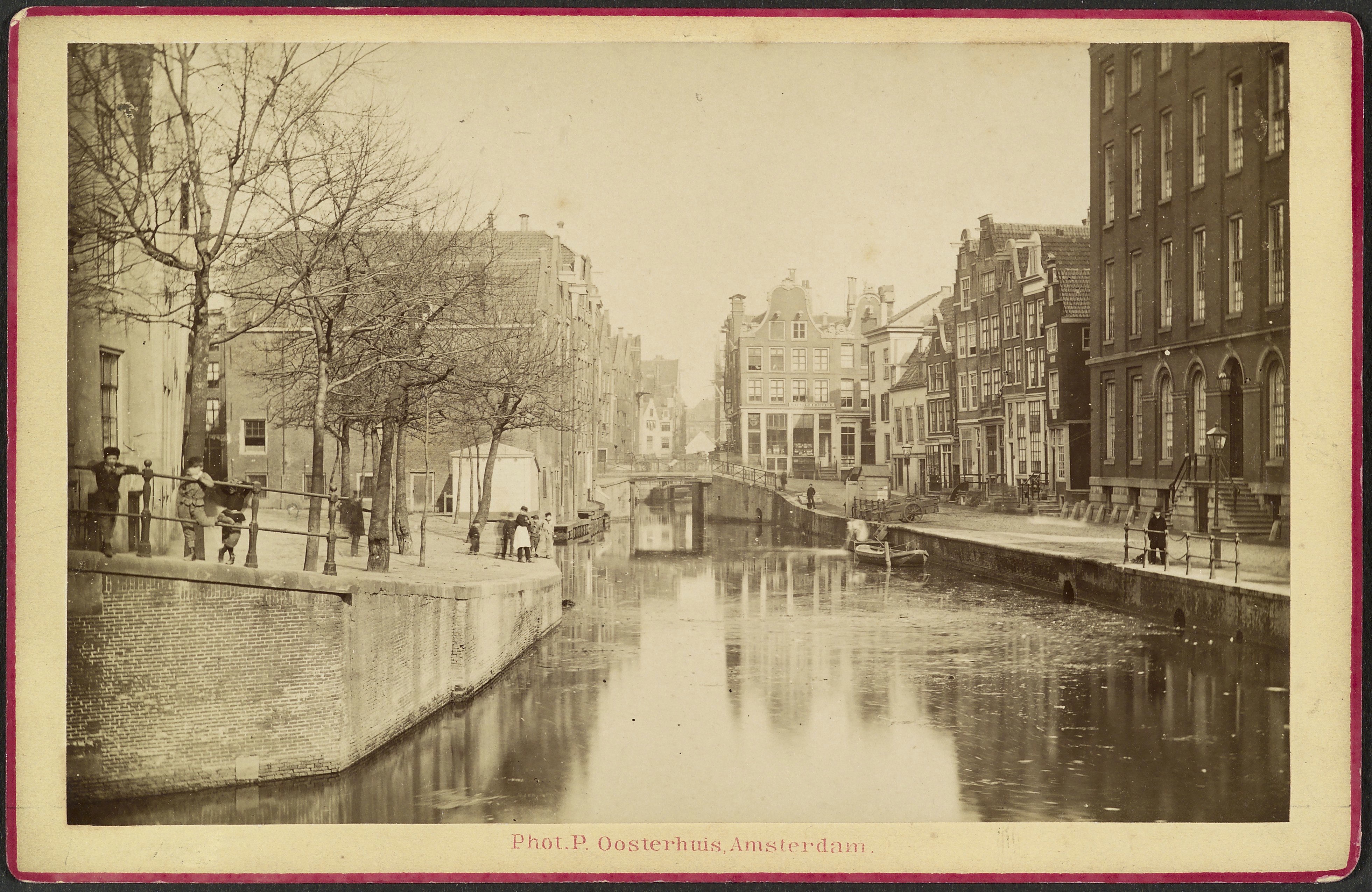 Gracht: Stadsgezicht met gracht (opmerking: Kabinetfoto); ongedempte Spui met uiterst rechts het Maagdenhuis; in de verte brug Osjesluis in de Kalverstraat over het Spui, overbodig na demping. In de 20e eeuw is bijna alles hier gesloopt en vervangen